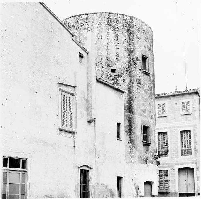 Torre de vigilància de Masnou a contrallum. Josep Salvany i Blanch (1912)